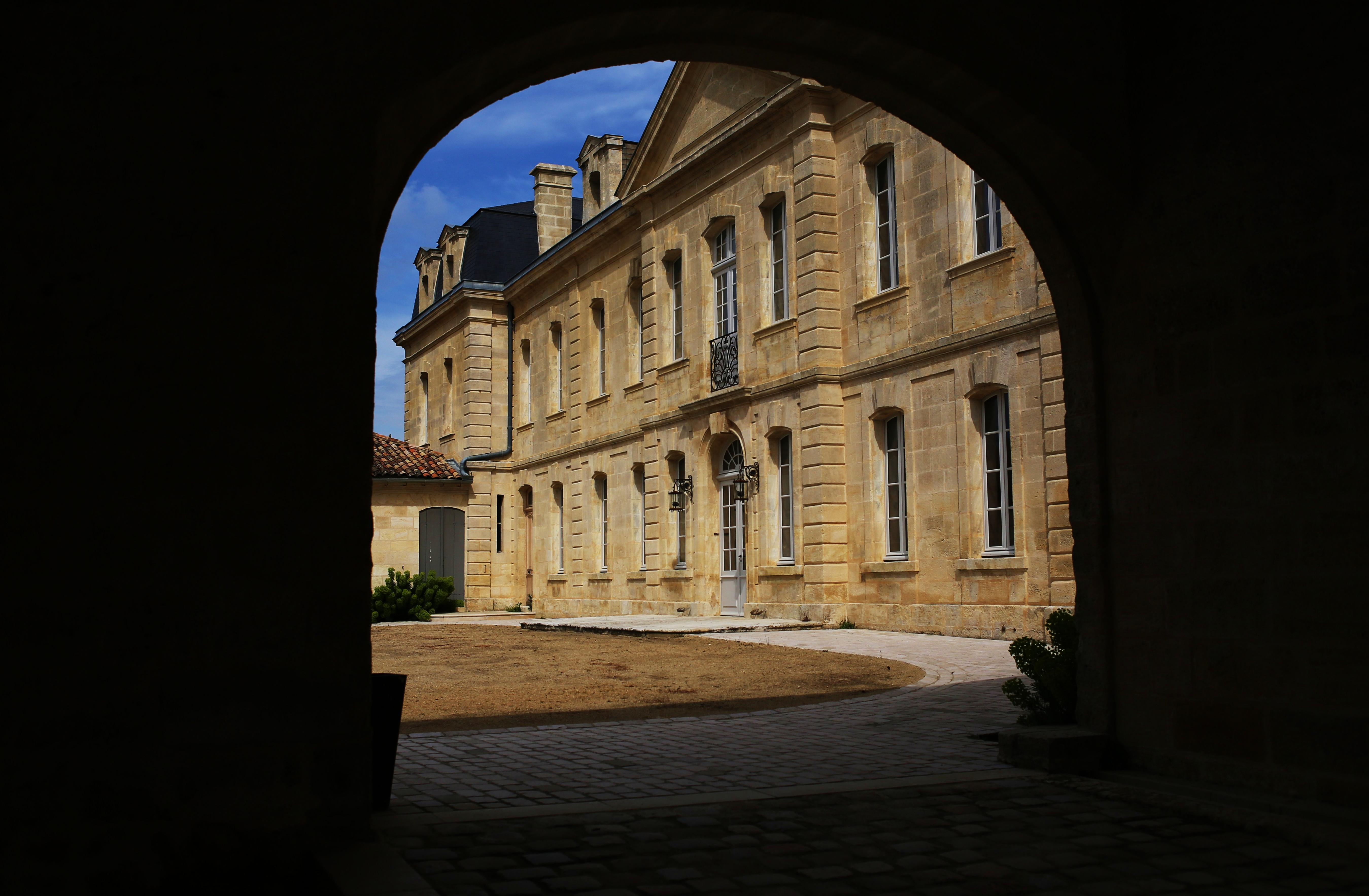 Le Château